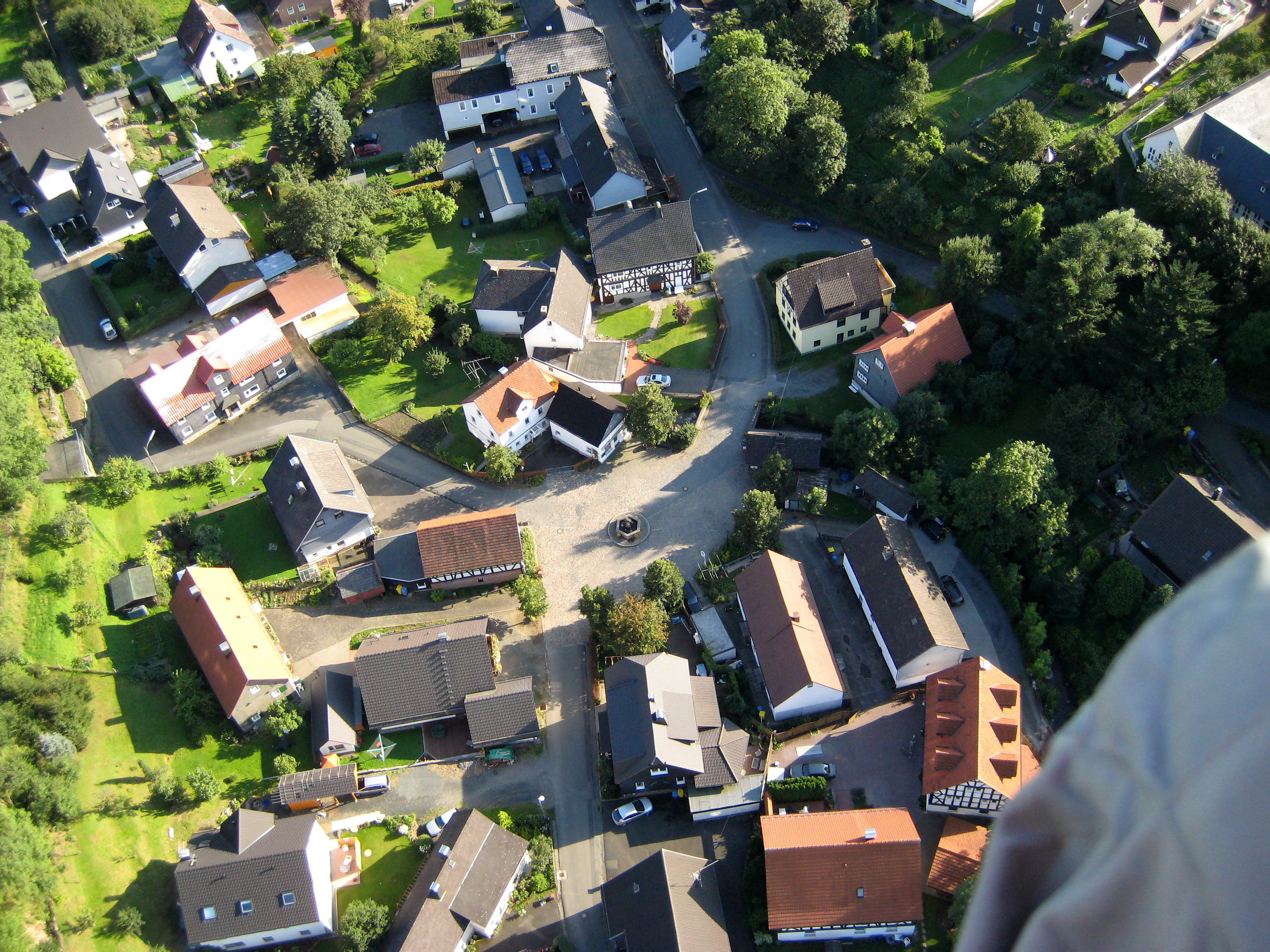 Dorfmittelpunkt Brunnenplatz